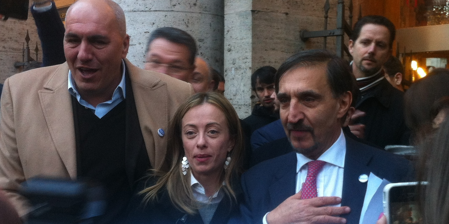 Conferenza stampa Meloni Crosetto